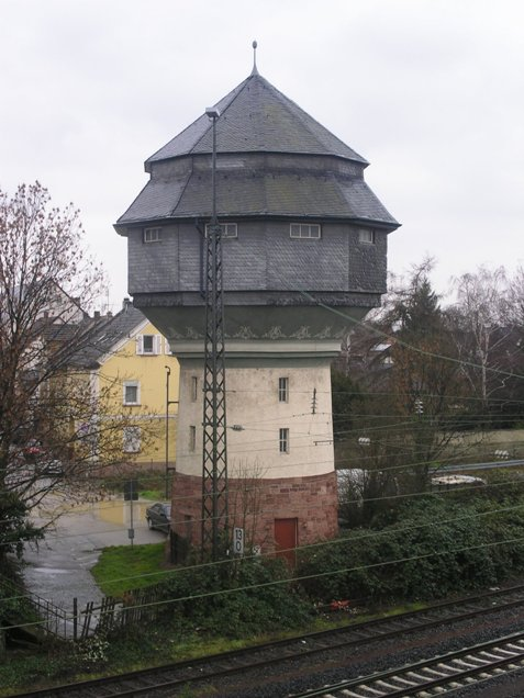 Bischofsheims Wahrzeichen: der Wasserturm im Jugendstil